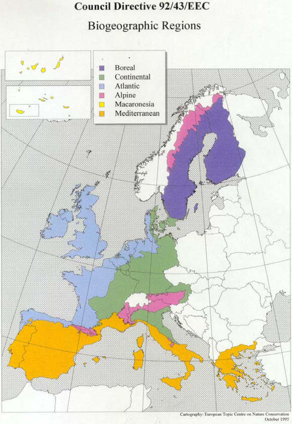 Схема біогеографічного поділу Європи станом на 1995 рік